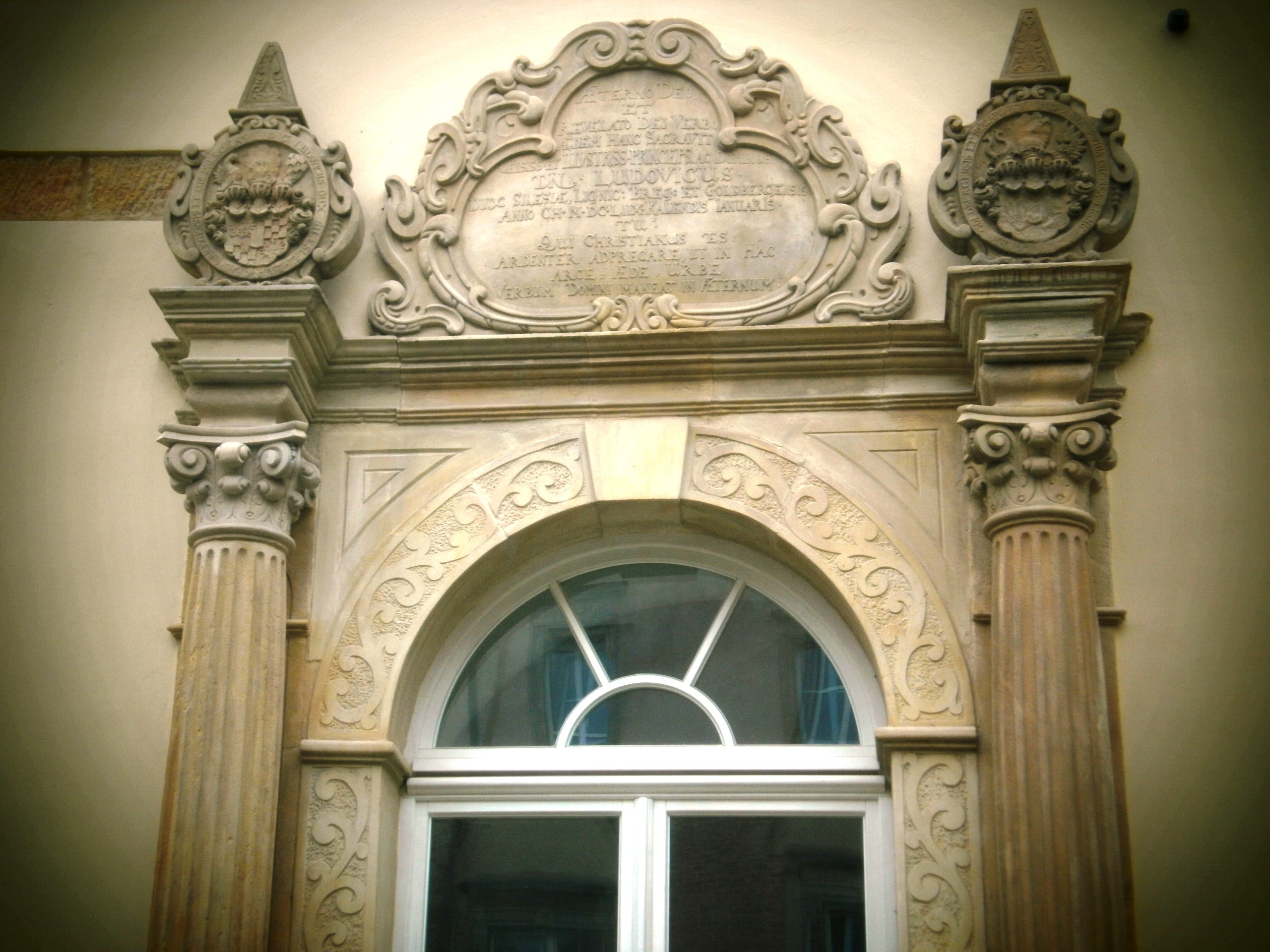 Legnica, zamek piastowski, XIII, XIX